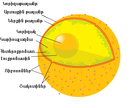 Մարդկային բջջի կորիզի կառուցվածքը